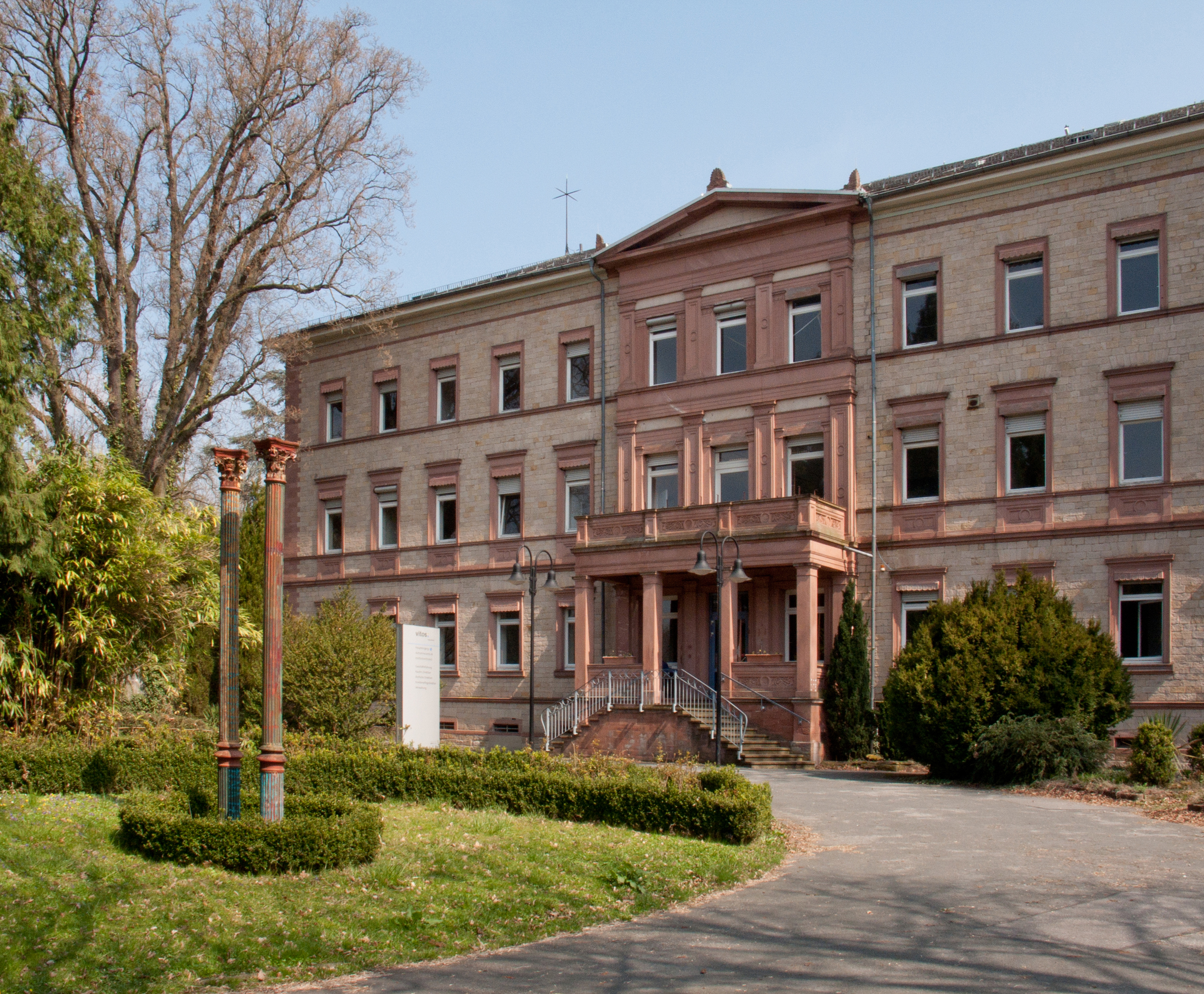 The Bergstraße Sports & Country Club. Rondell an der Hauptzufahrt mit ehem. Verwaltungsgebäude.